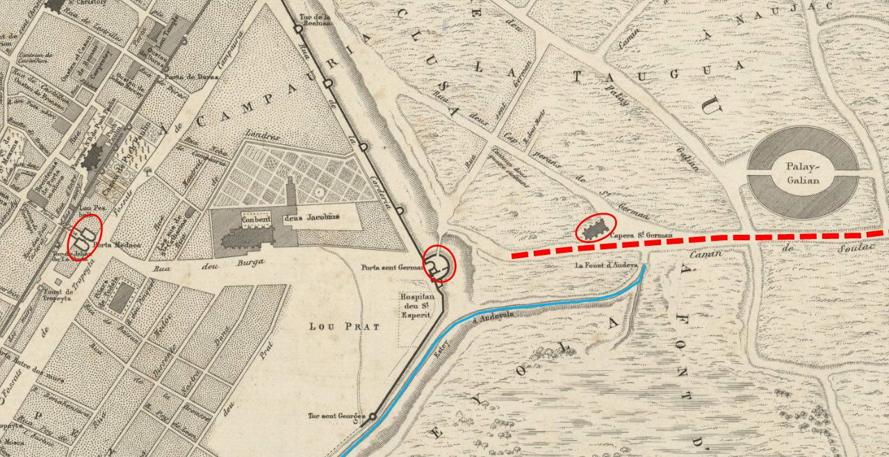 Sur fond d'un extrait du plan de Bordeaux vers 1450 établi par Léo Drouyn